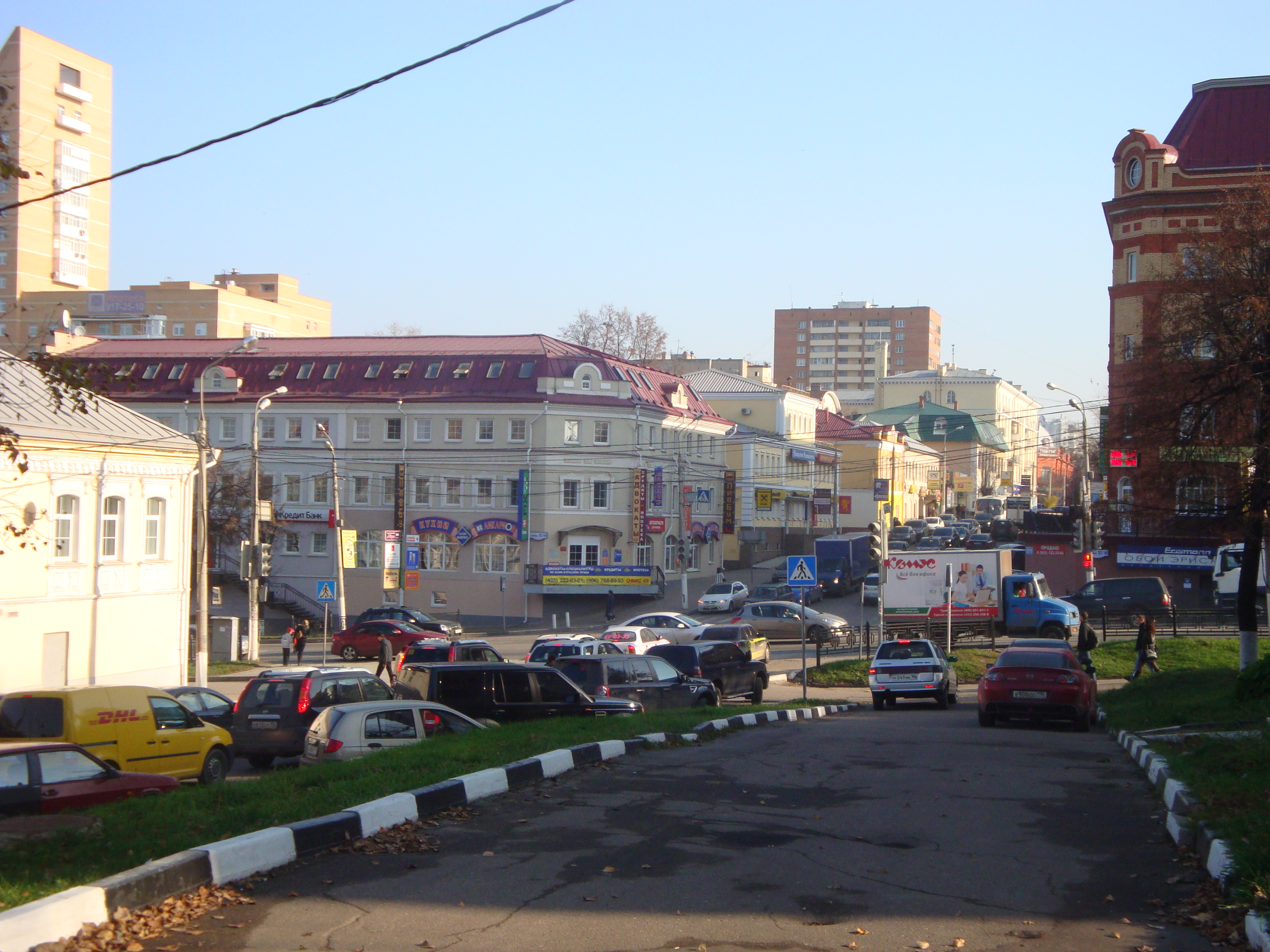 Здания в историческом центре Подольска на пересечении Февральской улицы и проспекта Ленина.